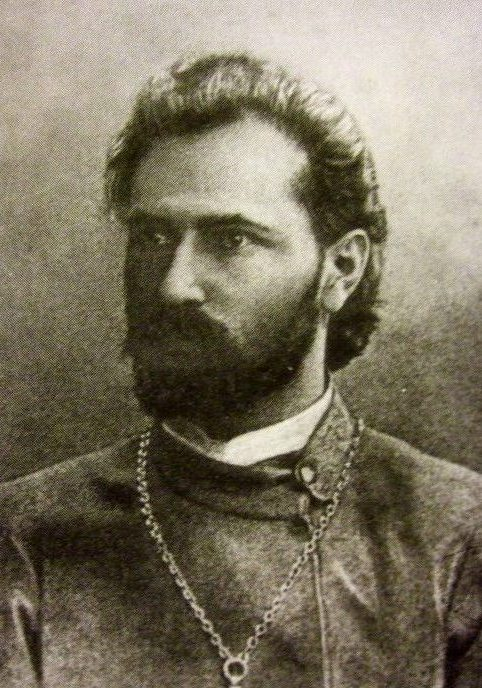 Русский священник и политический деятель Георгий Аполлонович Гапон (1870-1906)